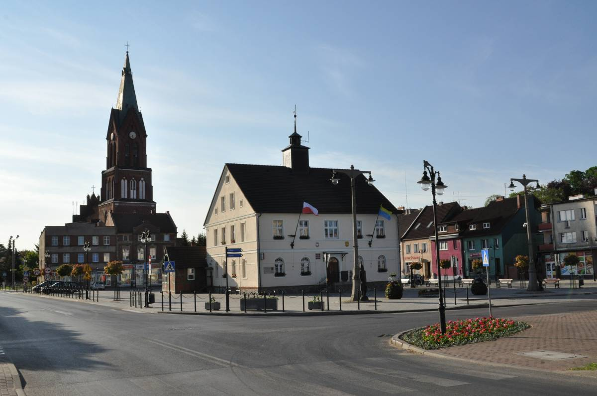 Widok na ratusz w Resku